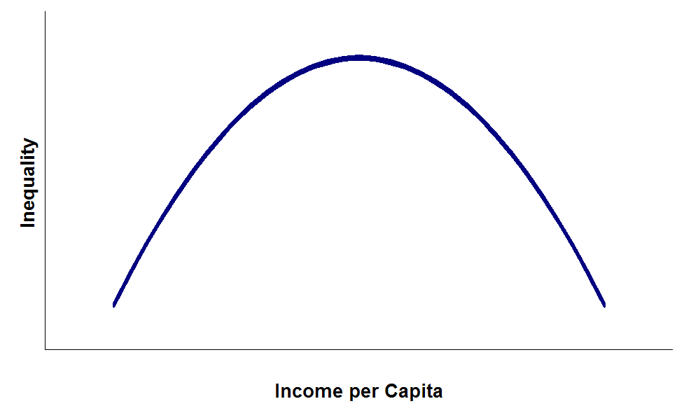 Parabola